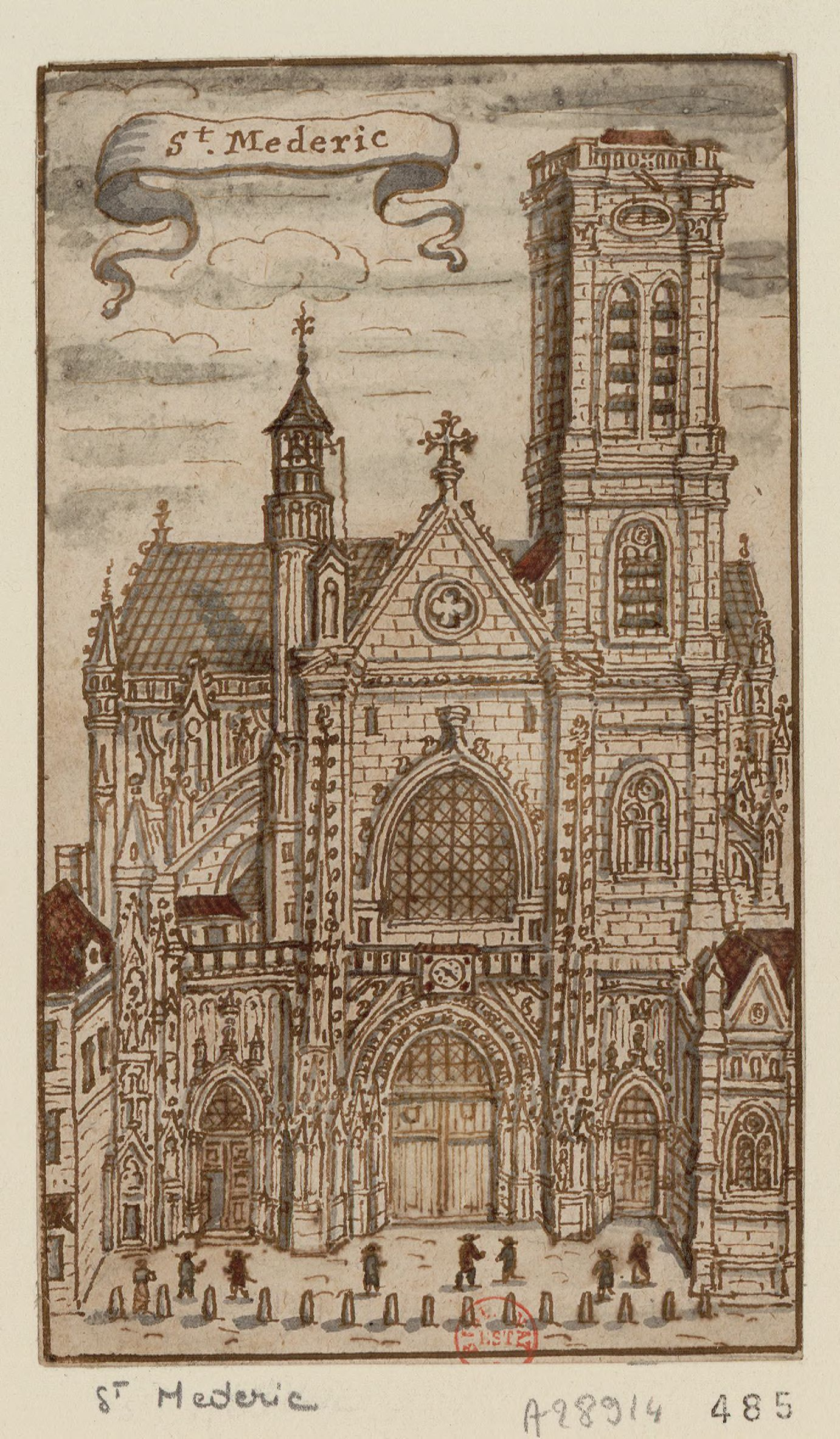 Église Saint-Merri, Paris, XVIIe siècle. Dessin à la plume et encre brune, lavis à l'encre de Chine, 13,5 x 8 cm, en provenance de la collection Hippolyte Destailleur.